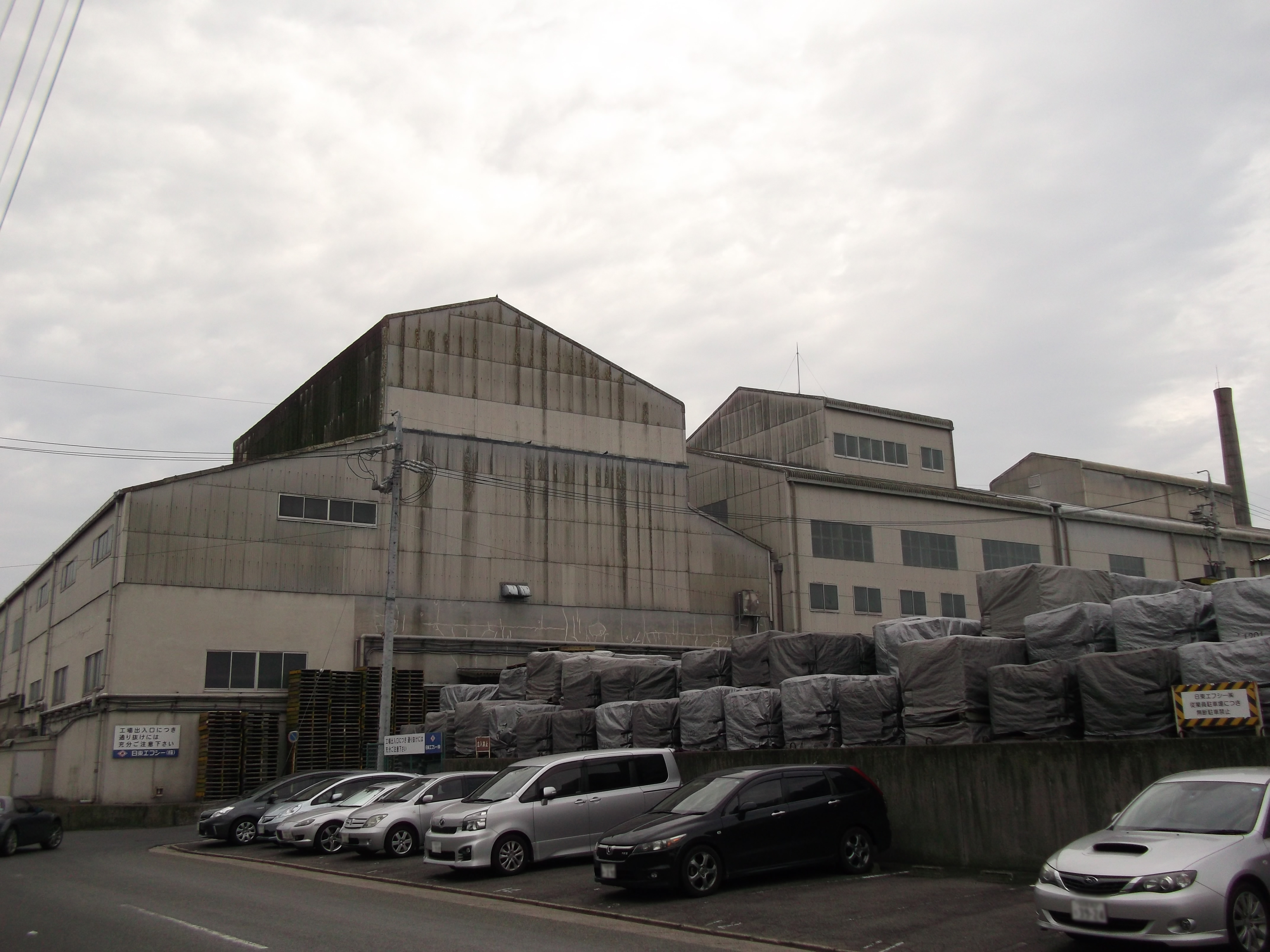 名古屋市港区いろは町の日東エフシー本社を西側公道南側より撮影。ただし、ナンバープレートにつき画像処理済。